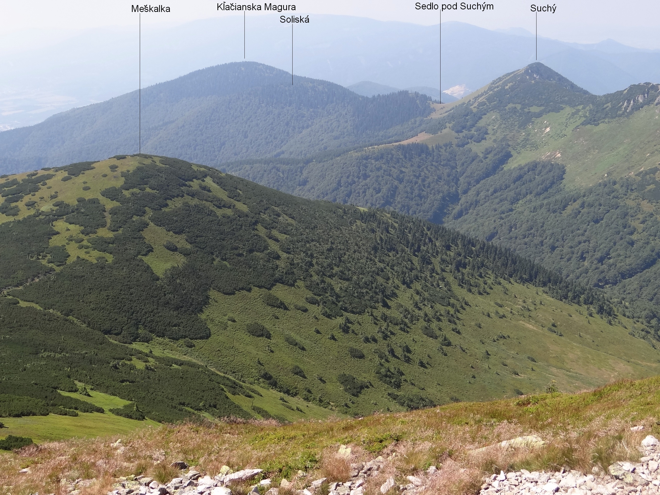 View from Malý Kriváň